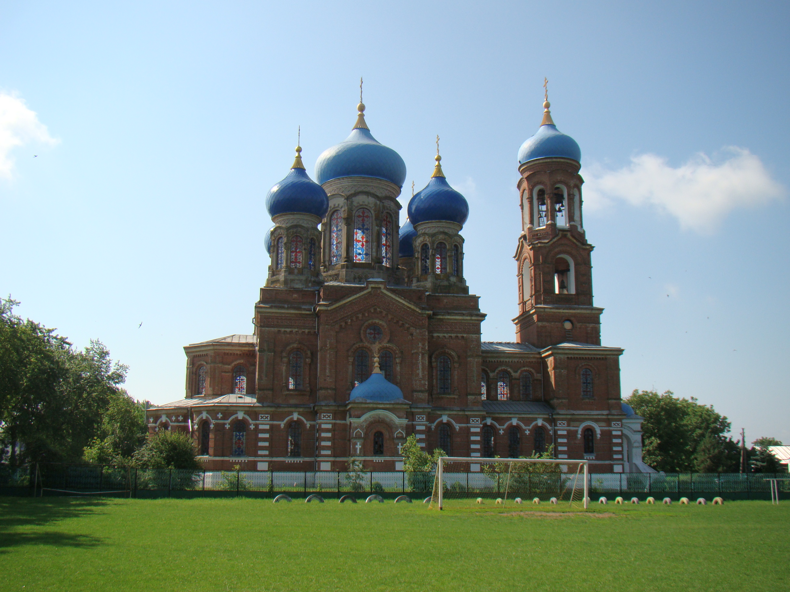 Станица Воронежская. Храм Рождества Пресвятой Богородицы (1911-1914 гг.)